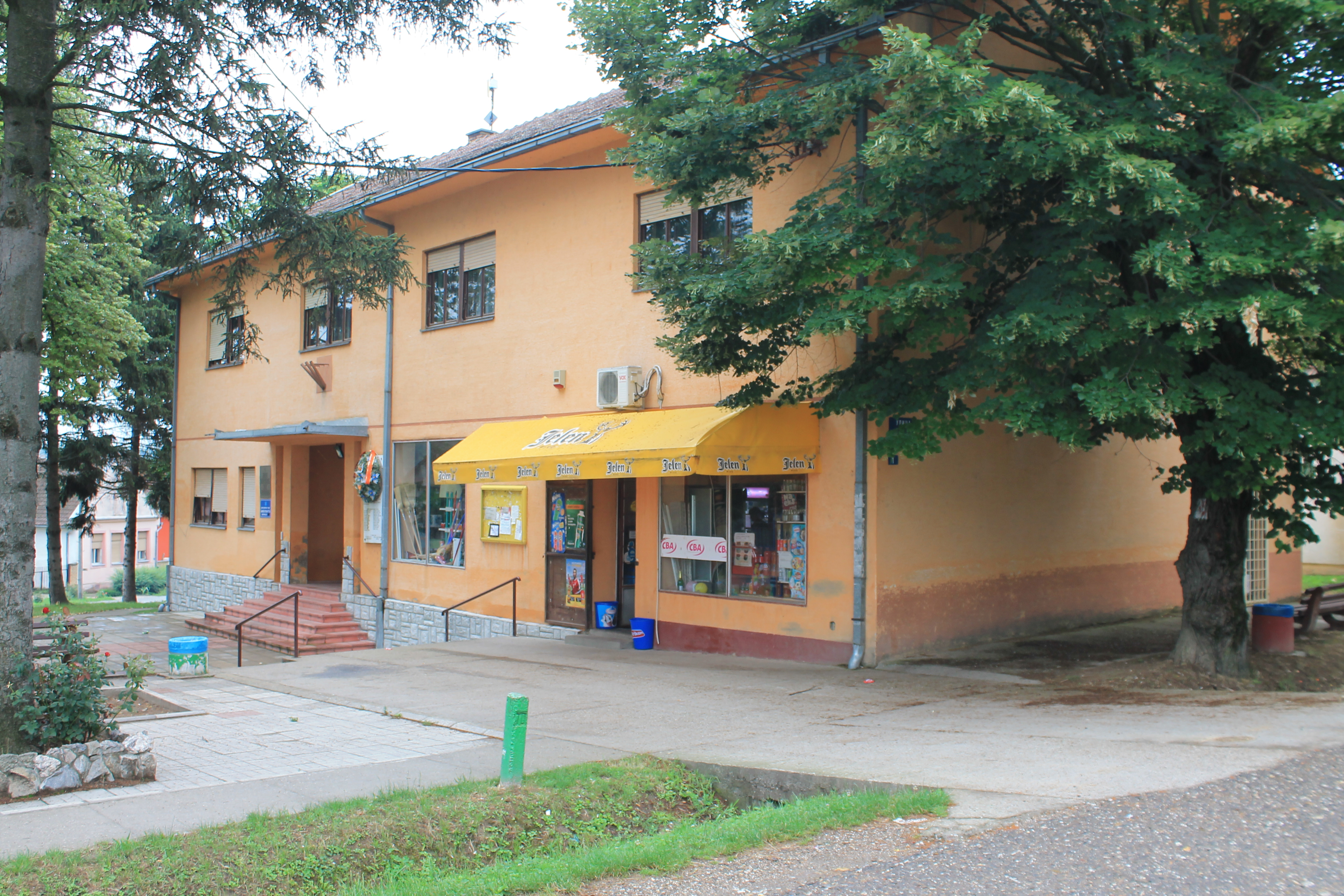 Berkasovo